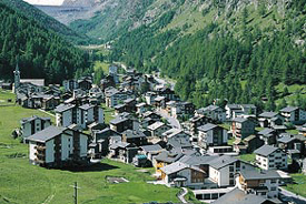 Dorfbild von Saas Almagell